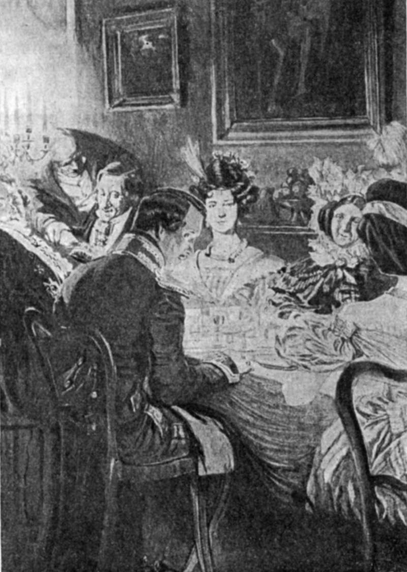 D. Kardovsky. Illustration for the story "The Princess Ligovski", 1914